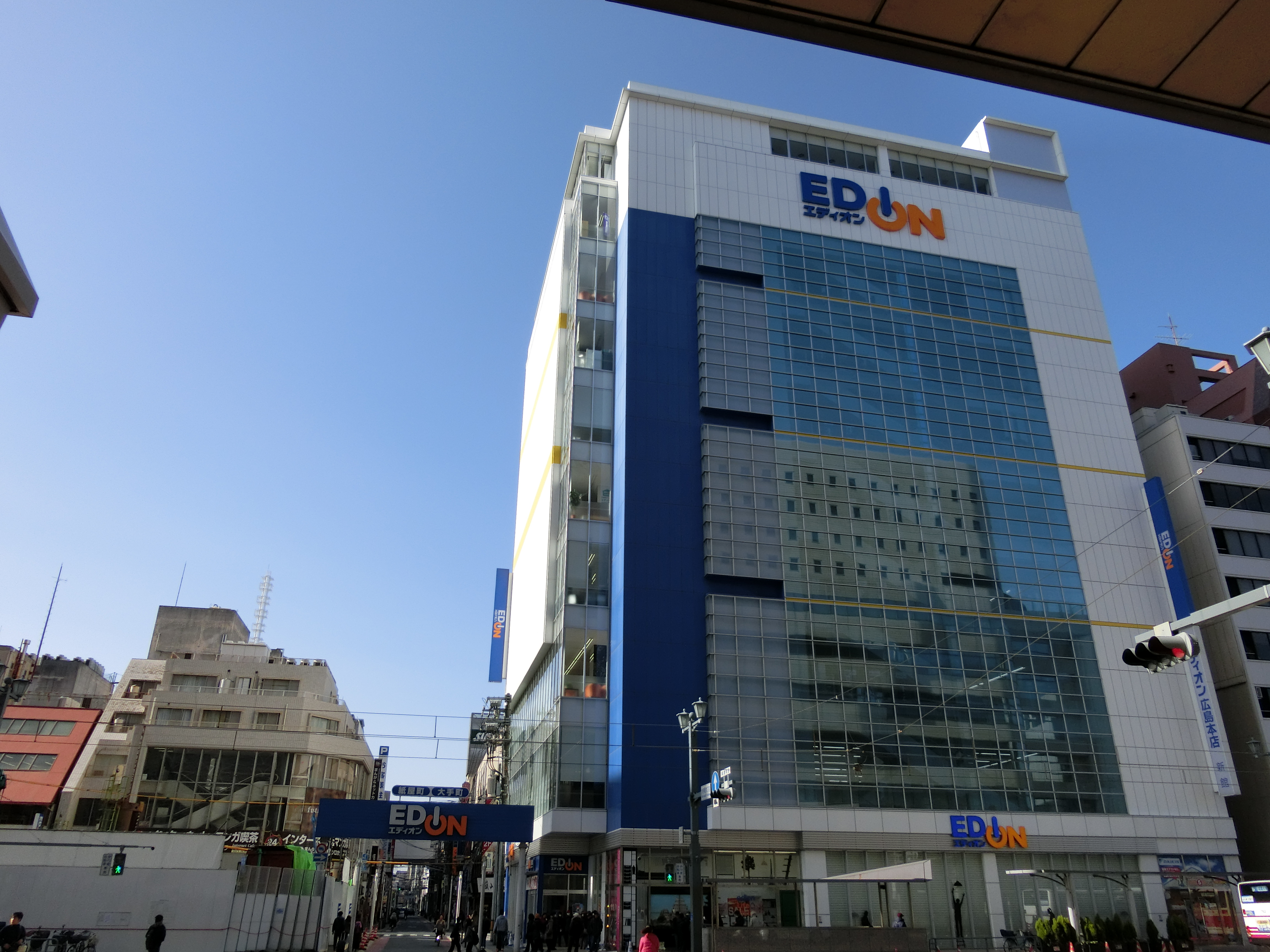 広島県広島市中区紙屋町にあるエディオン広島本店